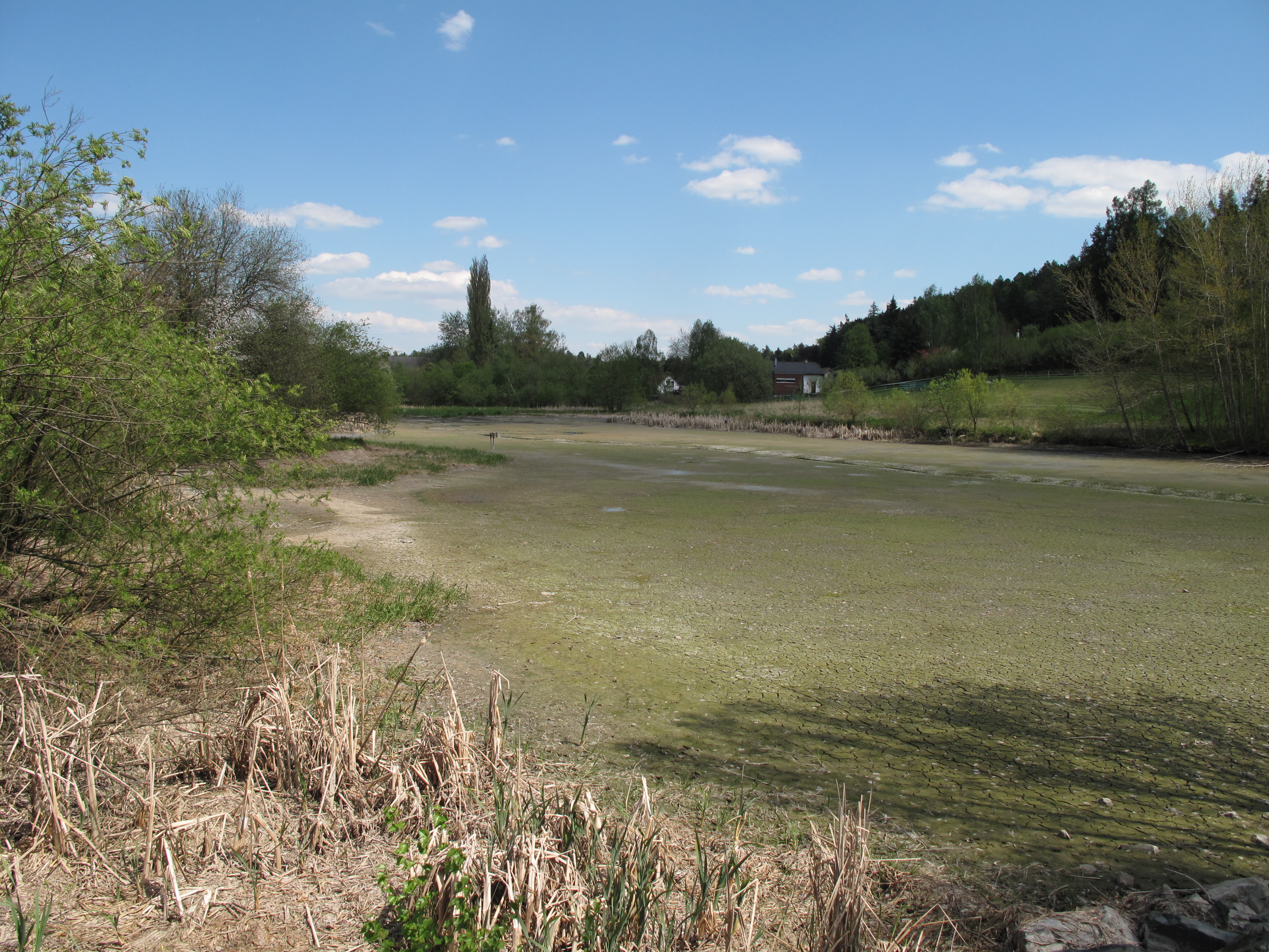 Rybník Nohavička. Okres Praha-východ, Česká republika.